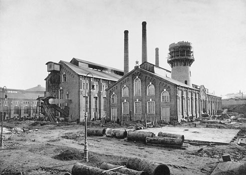 170. Газовый заводъ. Ретортное и аппаратное зданiе (со стороны коксовой площадки). (Москва)